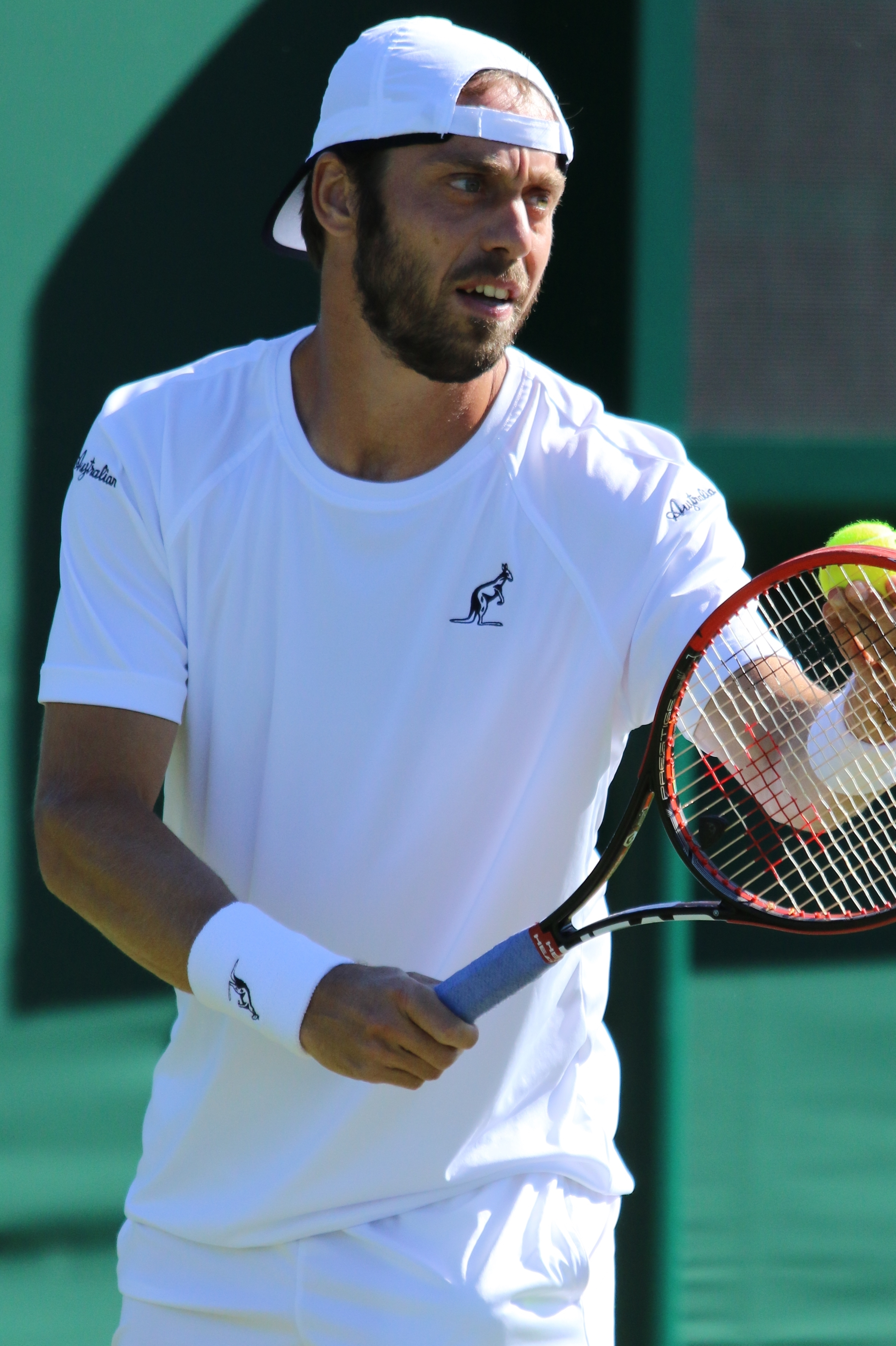 Lorenzi WM18 (5)